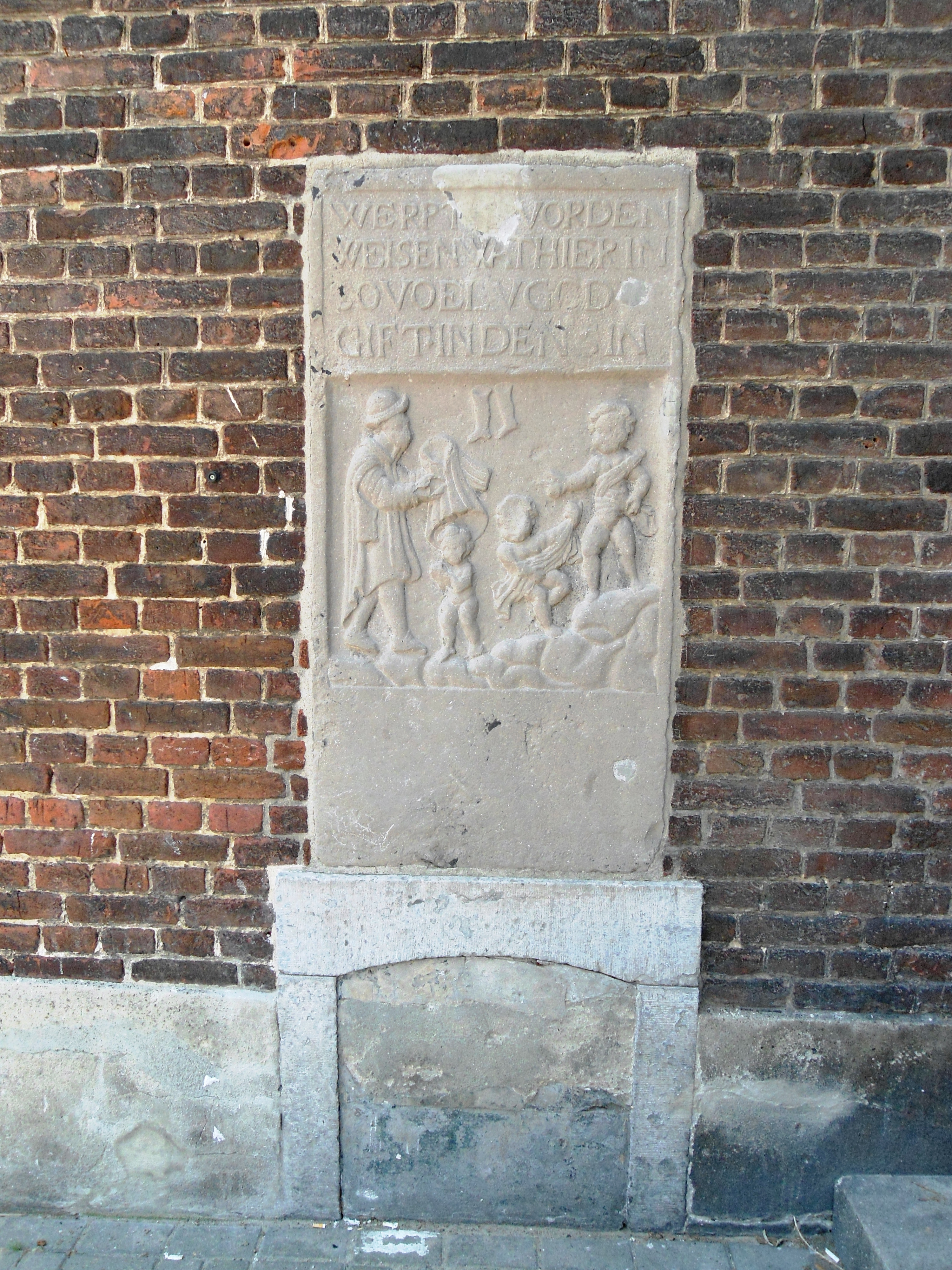 Gevelsteen in het noorden van het oude weeshuis